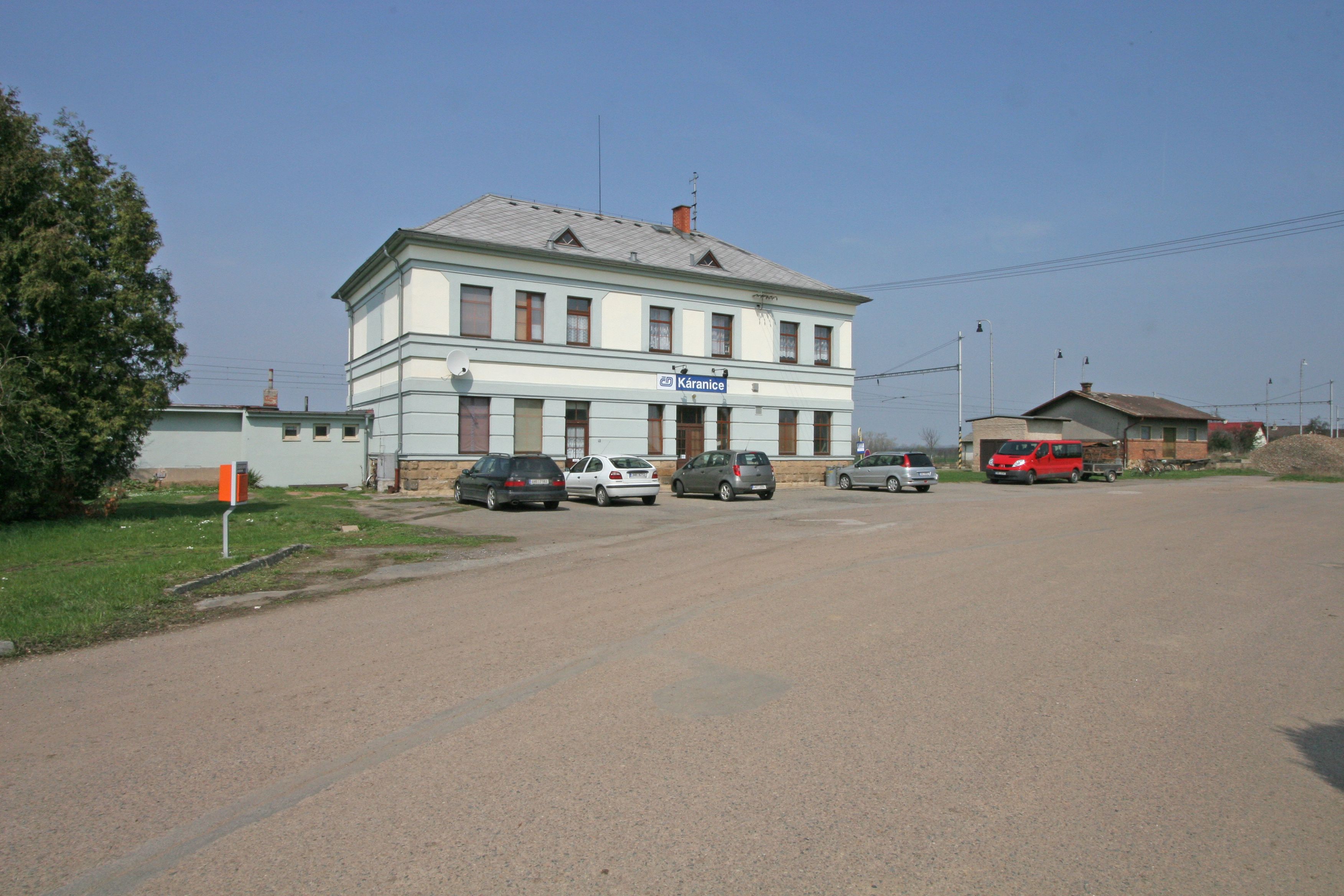 Káranice nádraží